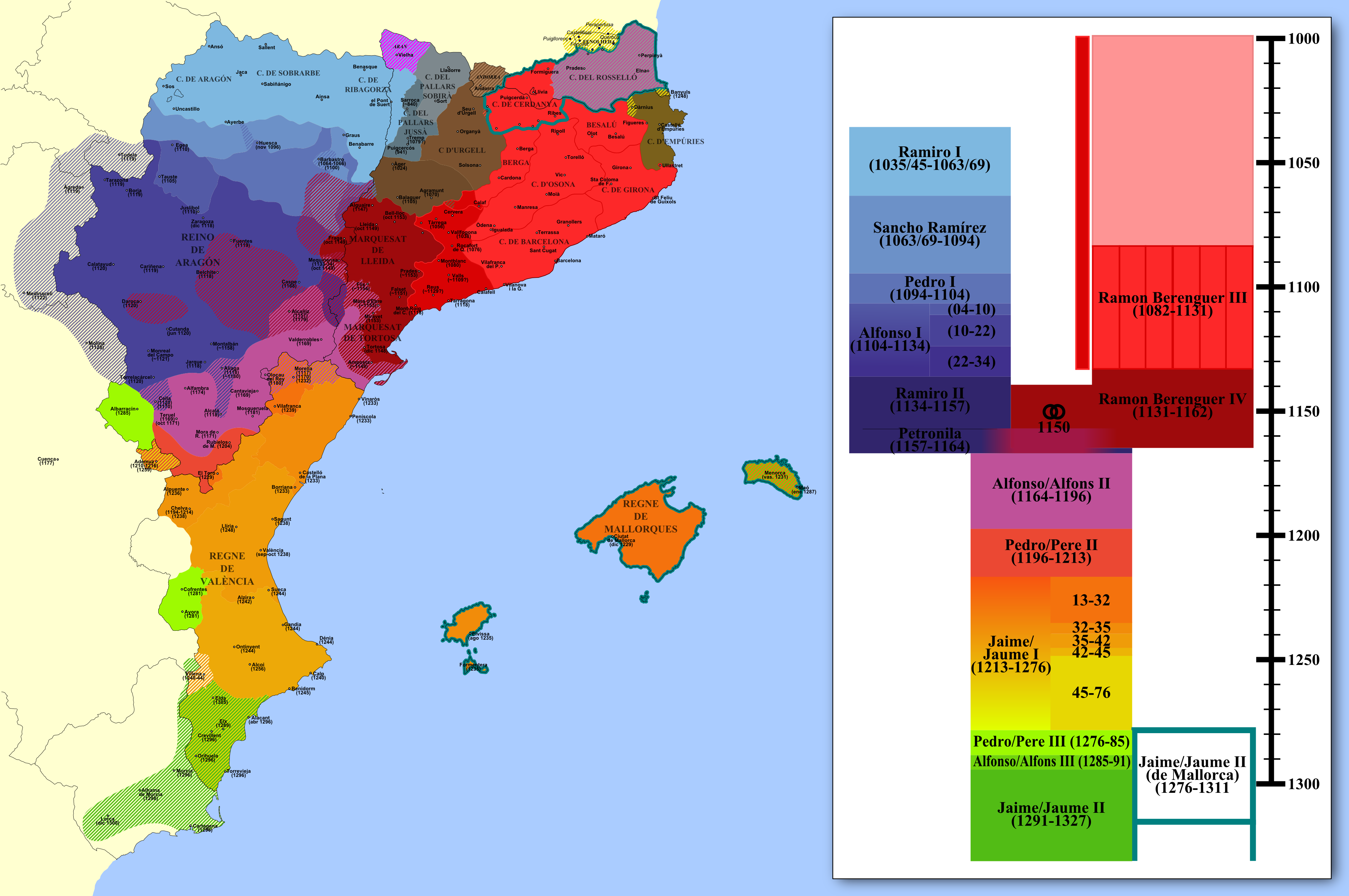 Mapa de la expansión de la Corona de Aragón en territorio balear y peninsular coloreado según monarcas y fases de conquista y fechado. Proyección de Mercator.